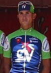 Comunidad Valenciana, Euskal Bizikleta 2005 Carlos Zarate Fernández